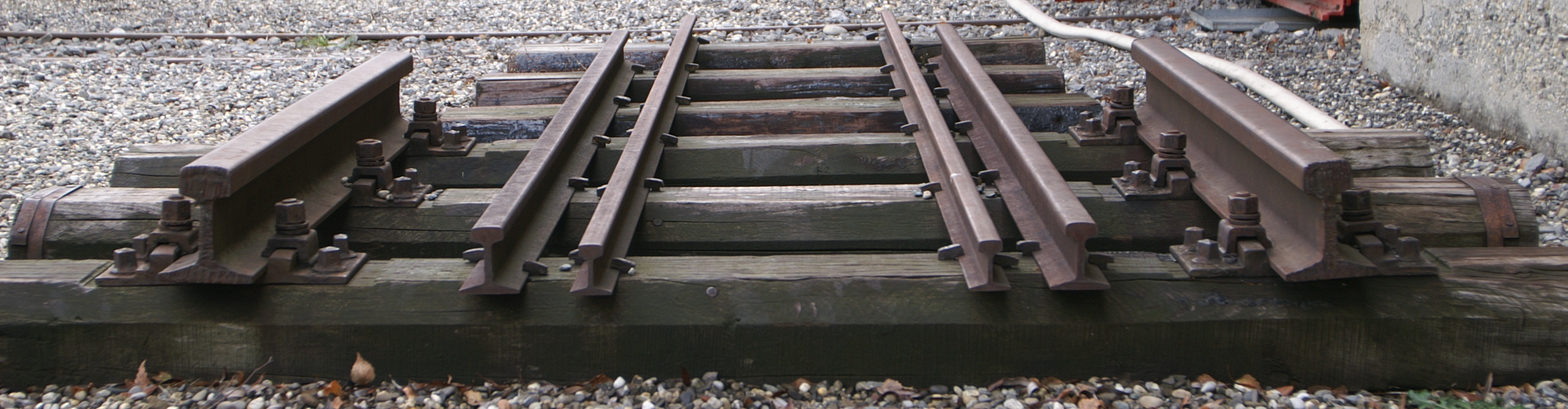 diverse Gleis-Spurweiten gesehen bei der Internationalen Rheinregulierung in Lustenau.